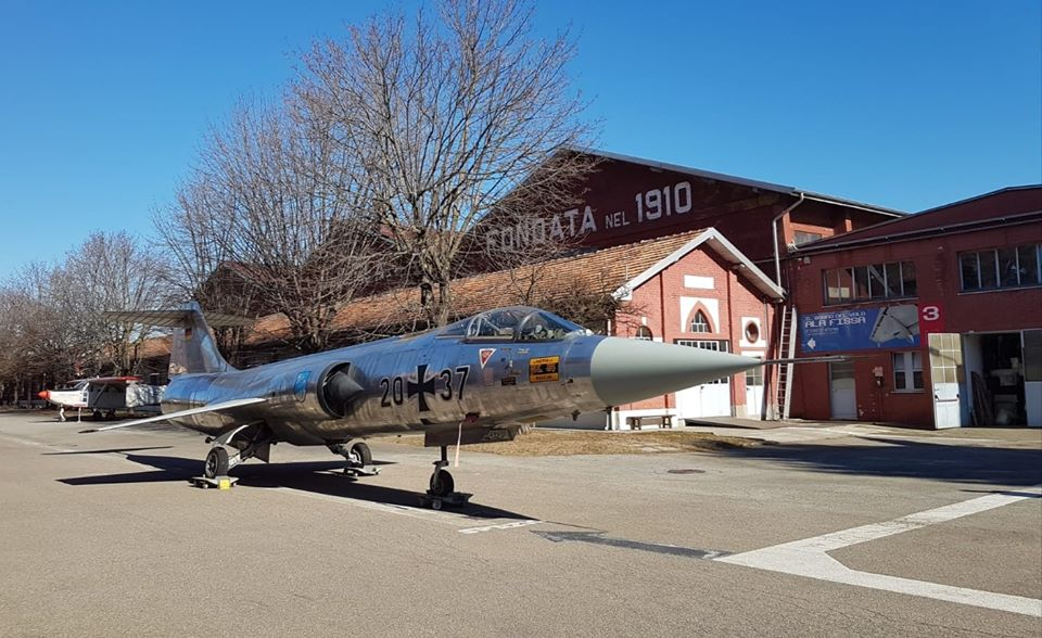 F-104 del Luftwaffe museum di Berlino in prestito a Volandia